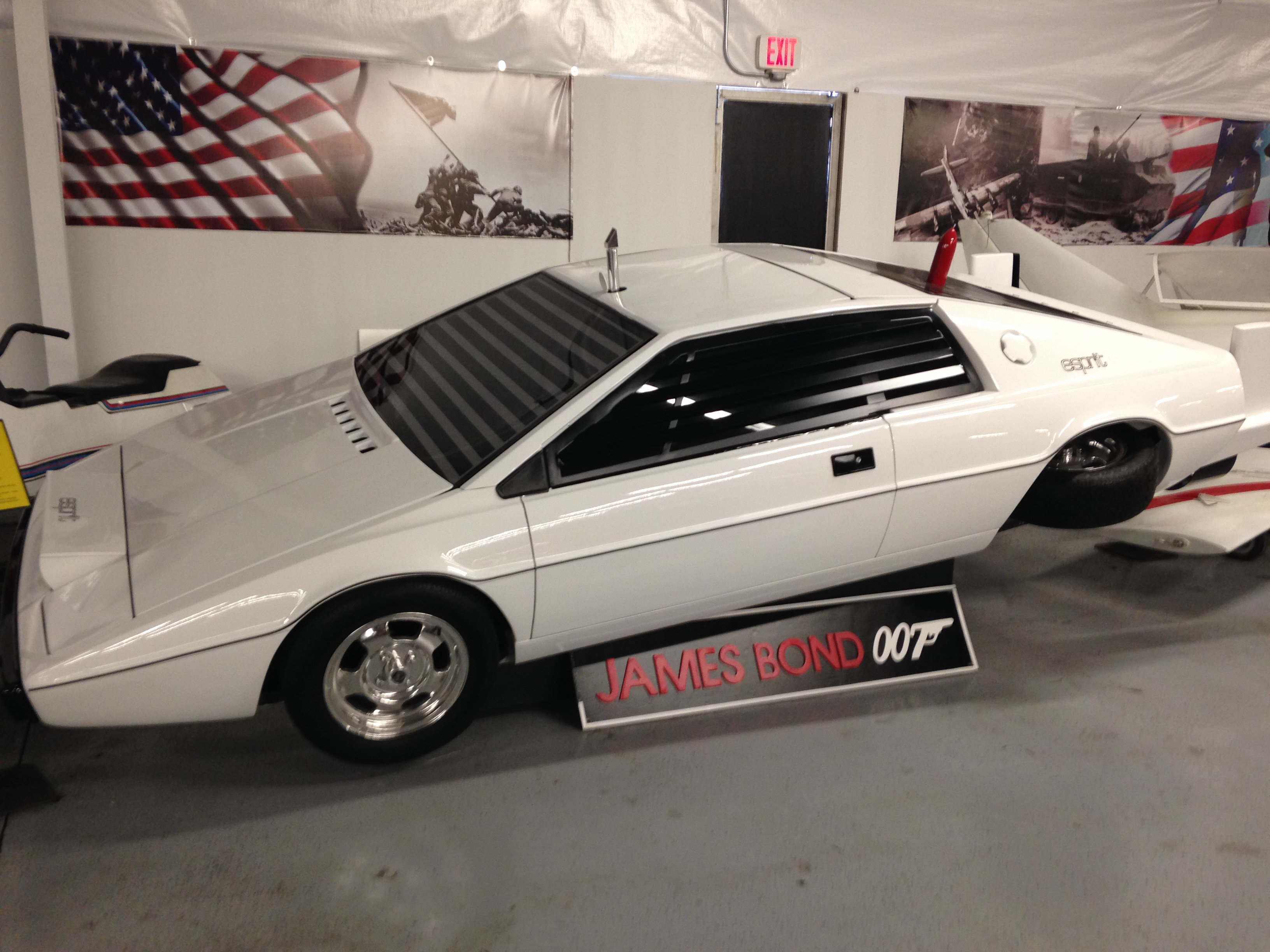 James Bond Submarine Car from "The Spy Who Loved Me"